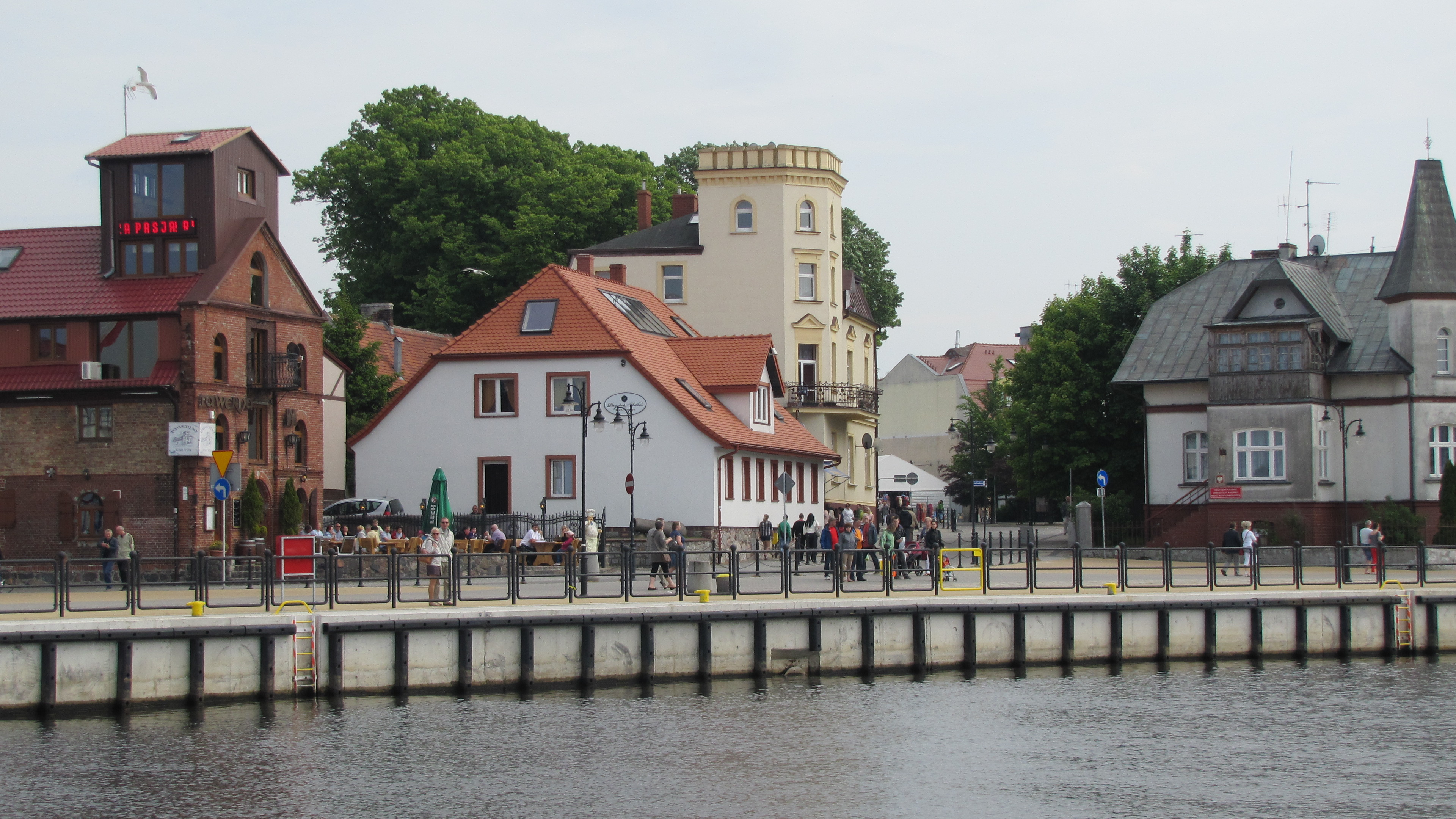 Nabrzeże Portowe.